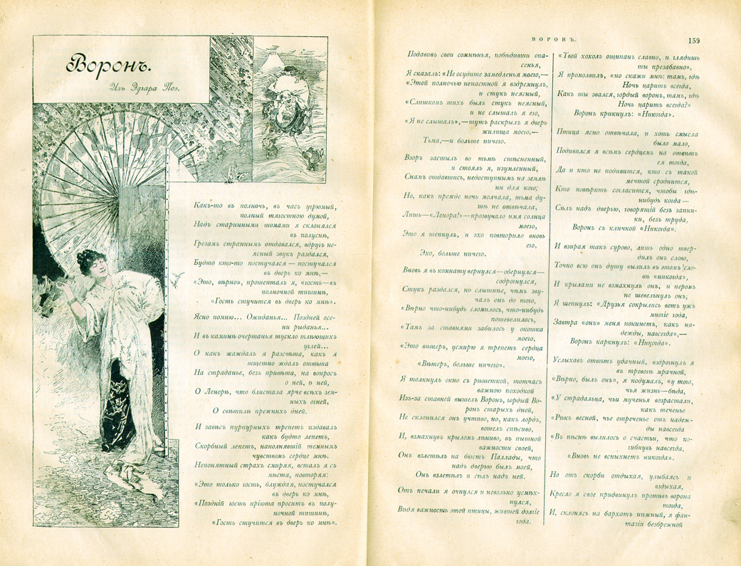 «Ворон», стих. Э. По, пер. с ан. К.Д.Бальмонт